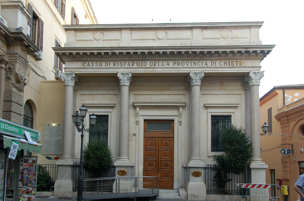 Chieti City 2011